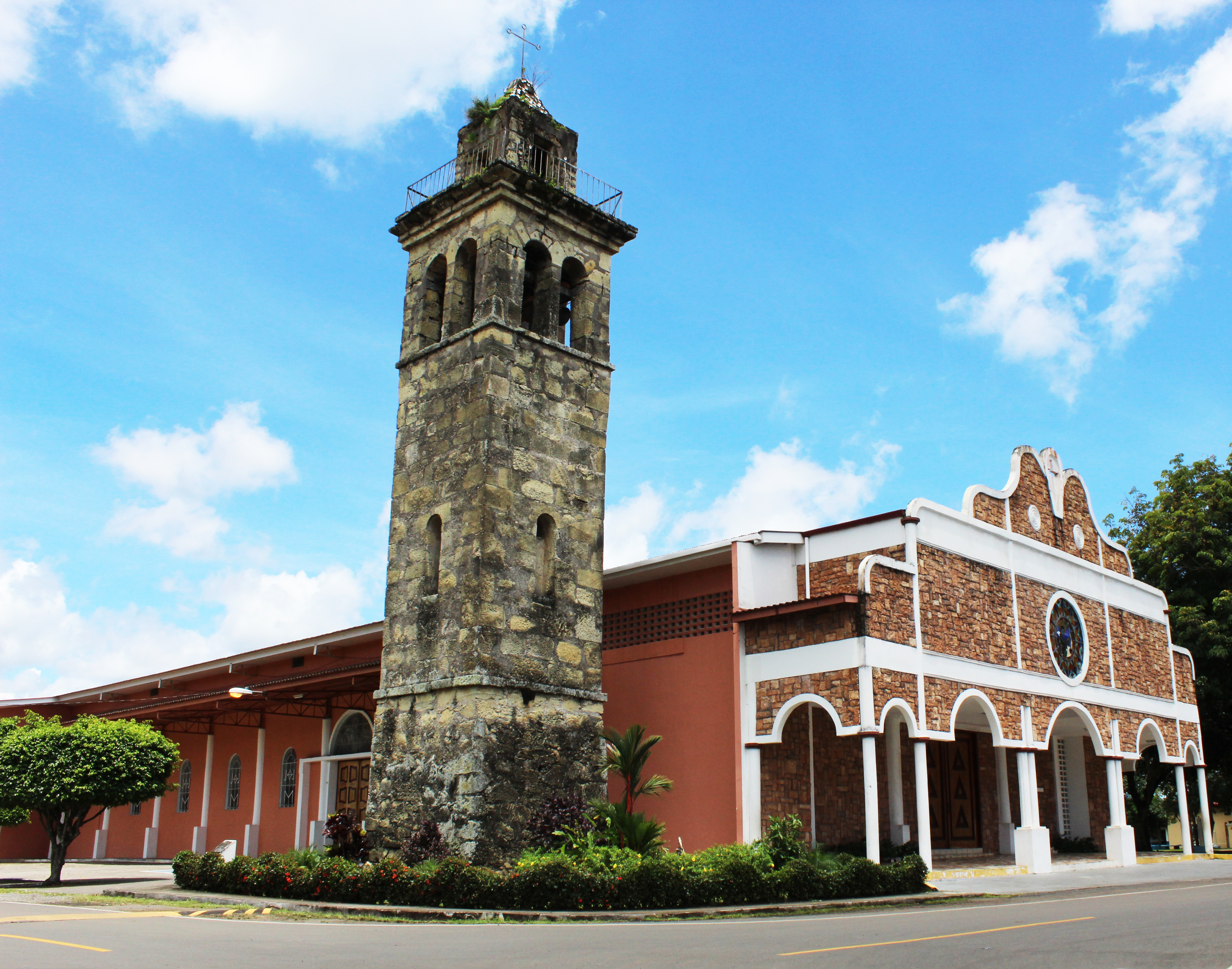 Torre Exenta de la Catedral de la provincia de chiriqui distrito de david